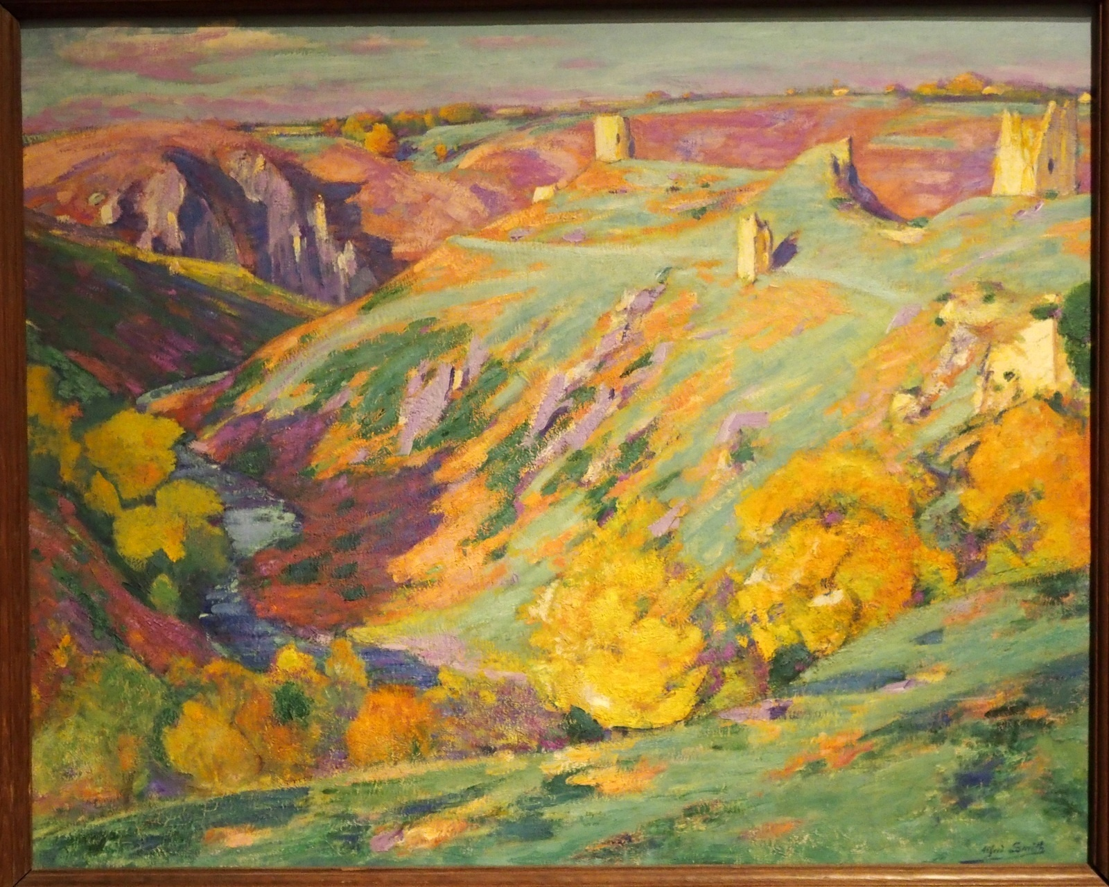 Crozant La Sédelle en octobre (c 1923)